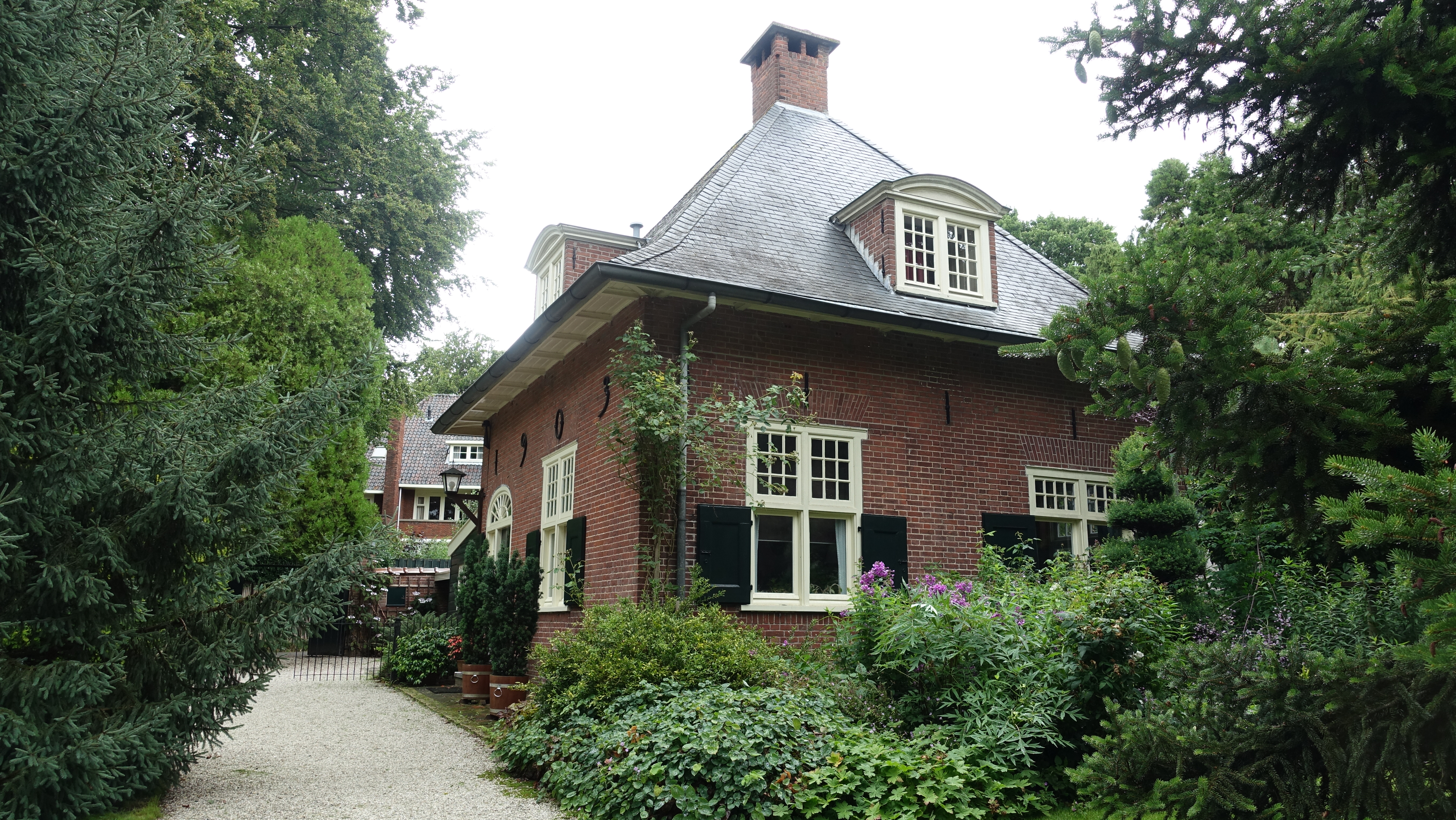 Pinetum Blijdenstein entreegebouw gemeentelijk monument. architect Johan Wilhelm Hanrath